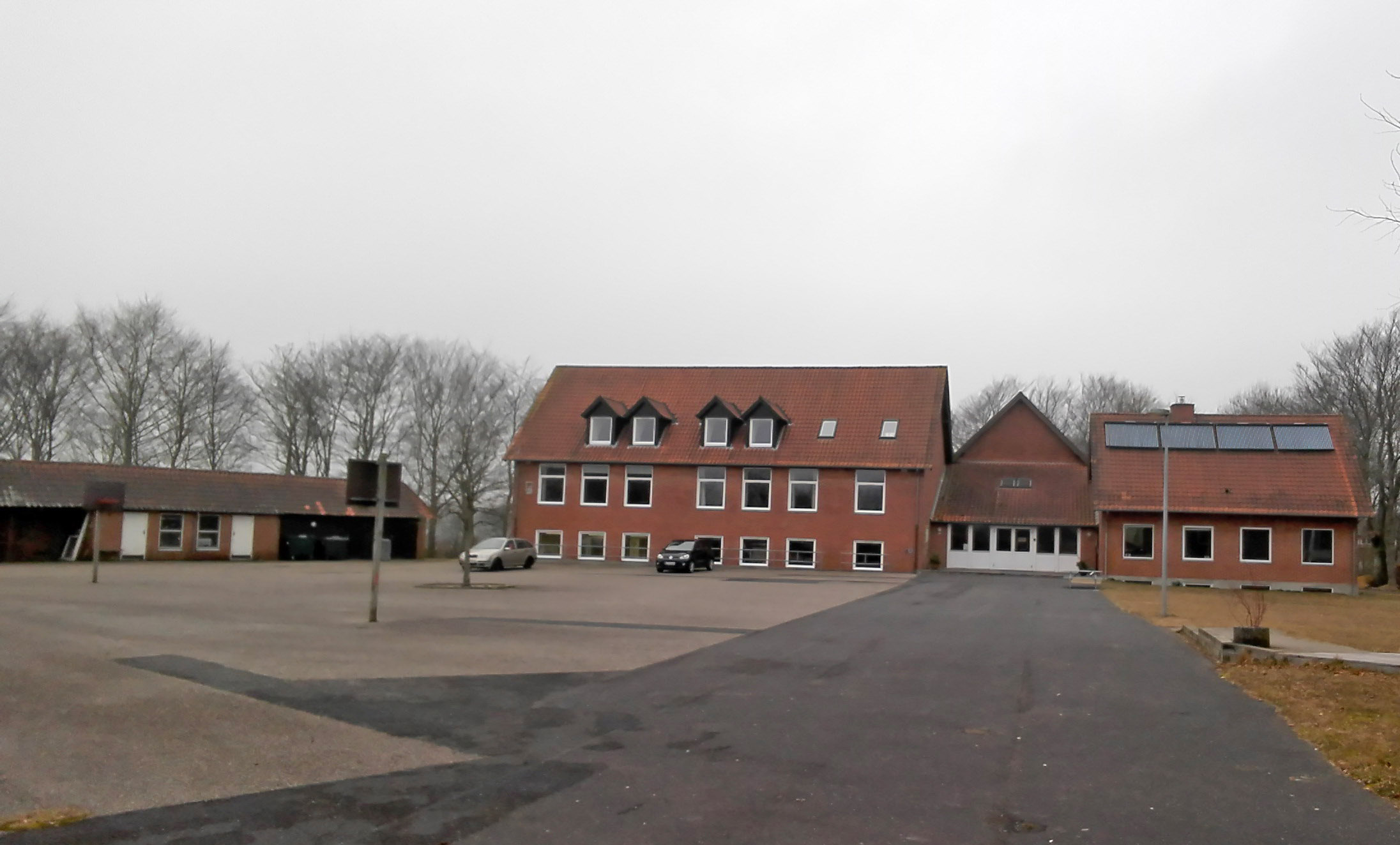 Hovedbygningen til natur- og aktivitetscentret Vindkraften i Vind